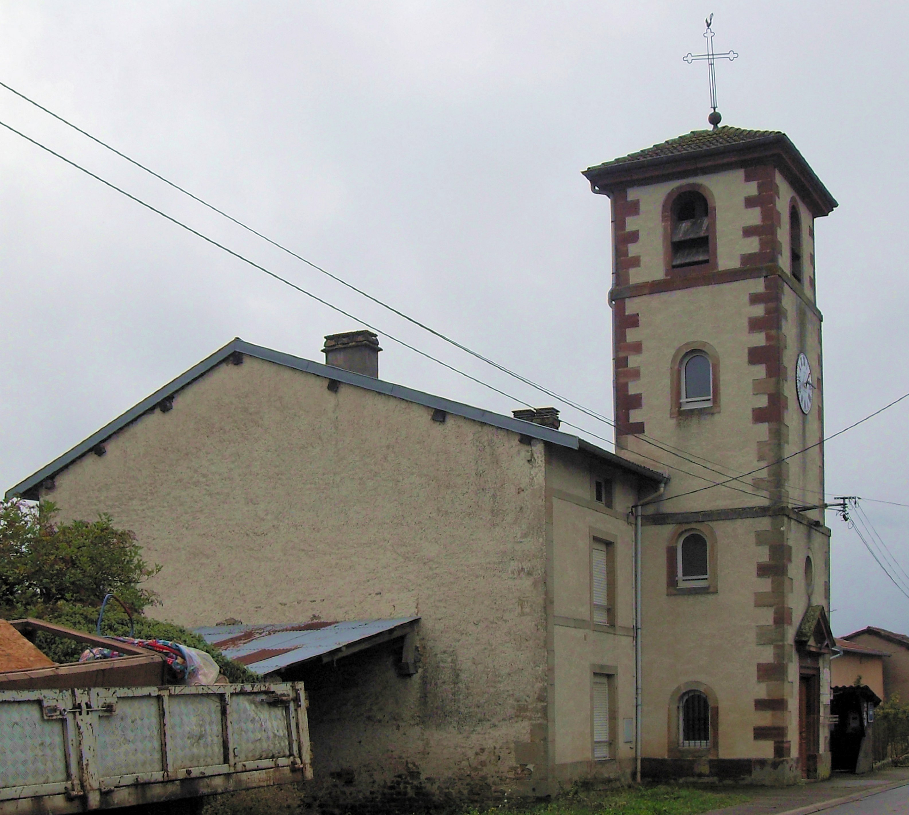 La mairie-chapelle de Frénois